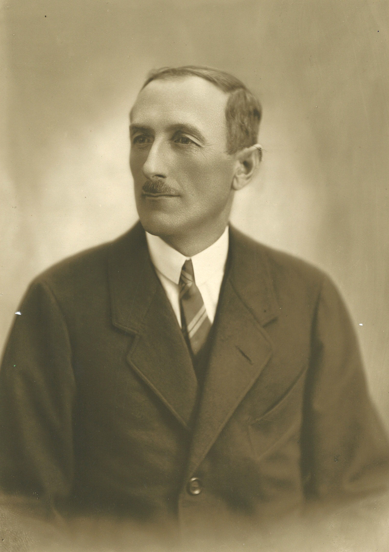 Balthasar Gierlinger (um 1922), Abgeordneter zum oö. Landtag, späterer Nationalrat und Bürgermeister von Anreit (Oberösterreich)